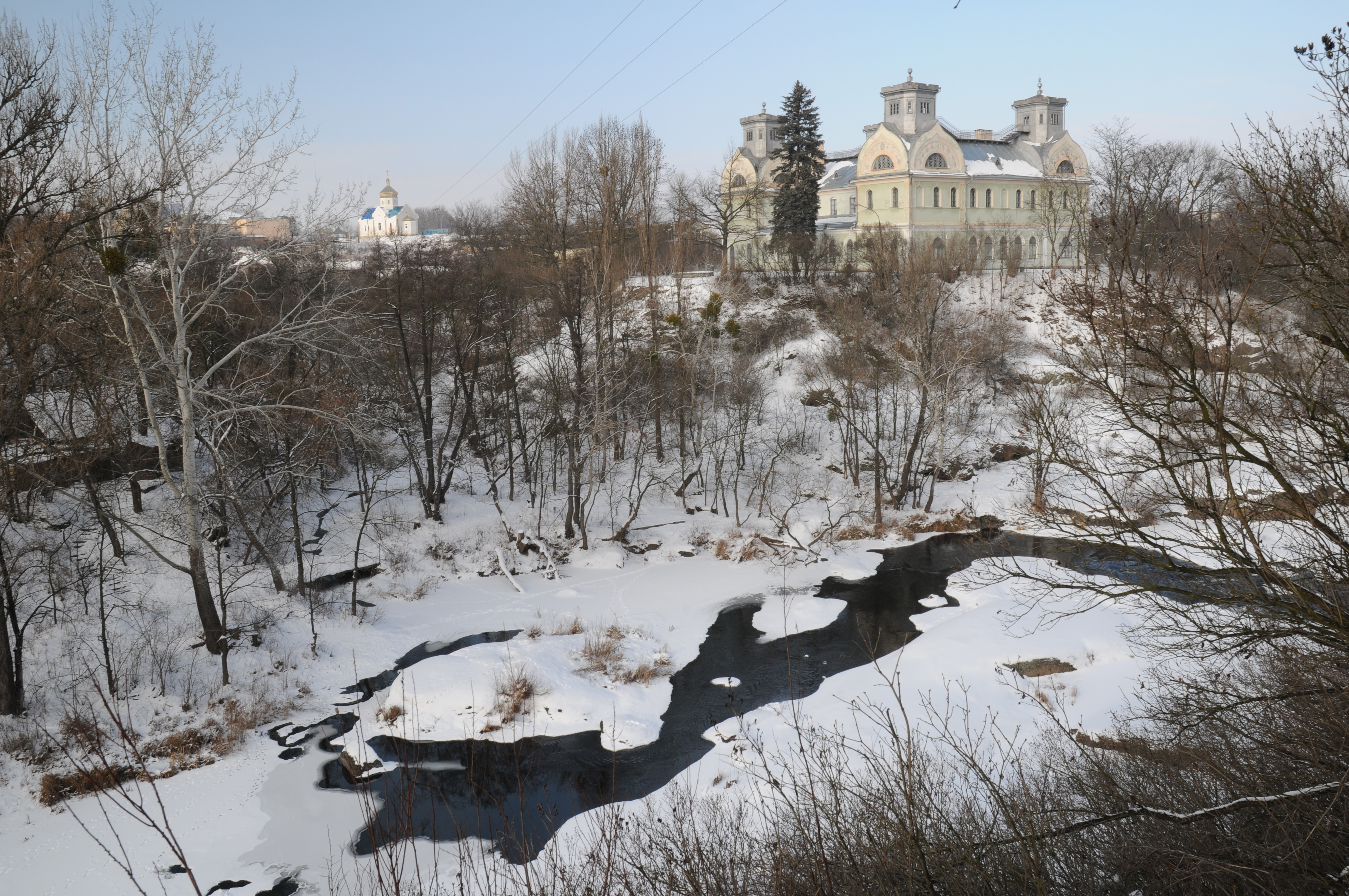 Палац Понятовського, згодом — садиба Лопухіних. Корсунь-Шевченківський, Черкаська область